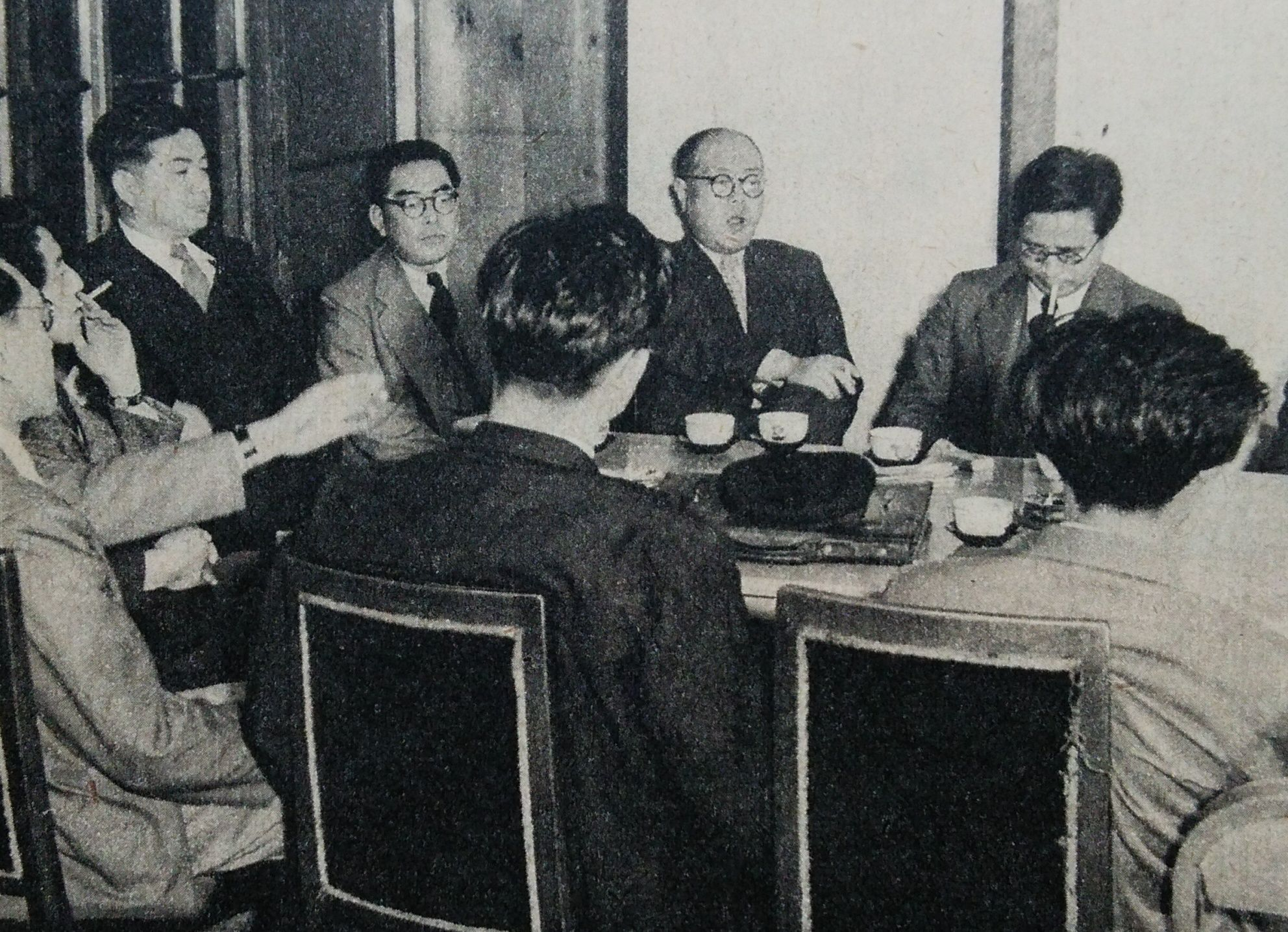 中国文学研究会（奥右端は武田泰淳。右から2番目は竹内好）